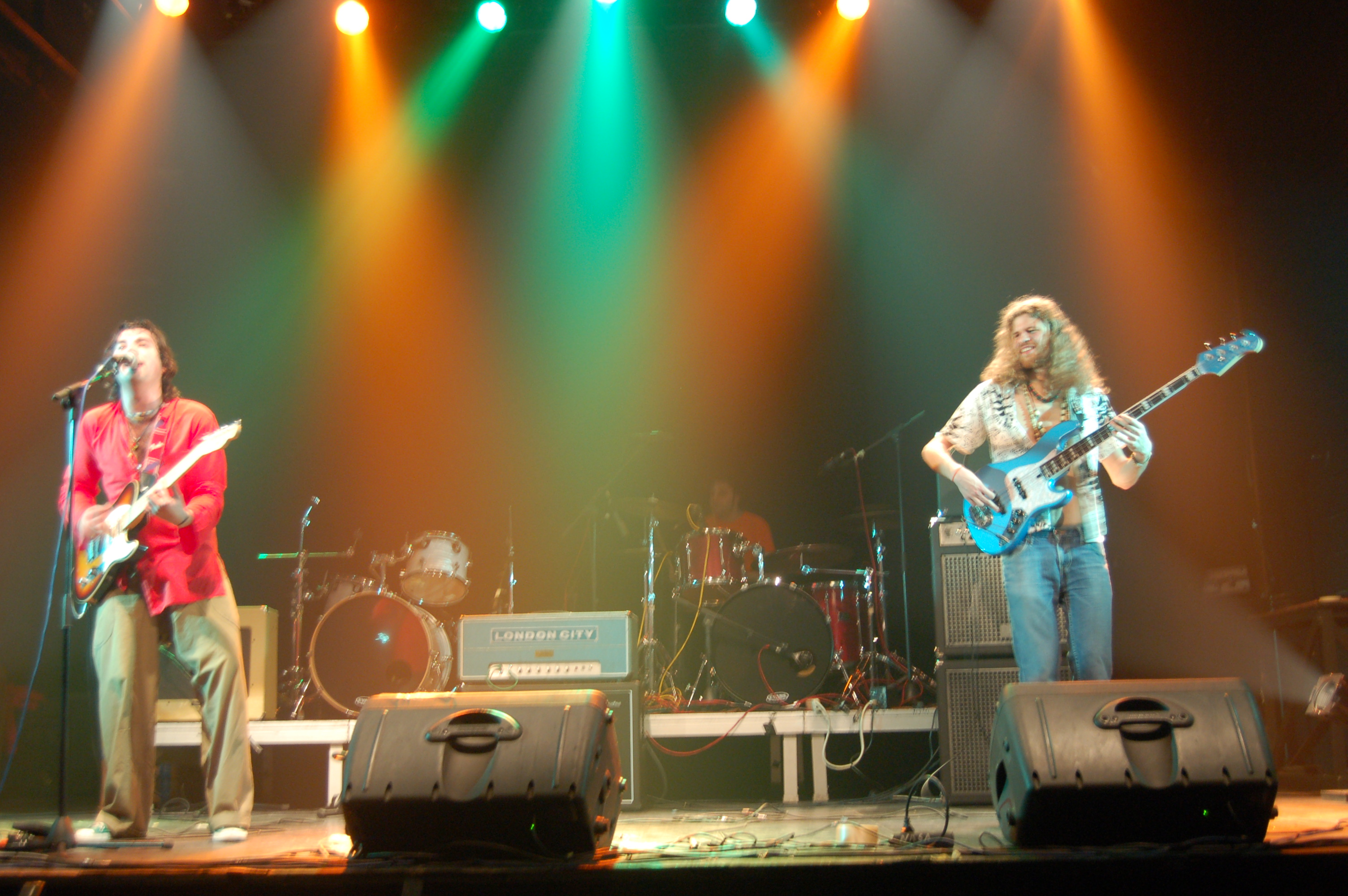 Concerto de Loretta Martin na sala Nasa de Santiago de Compostela